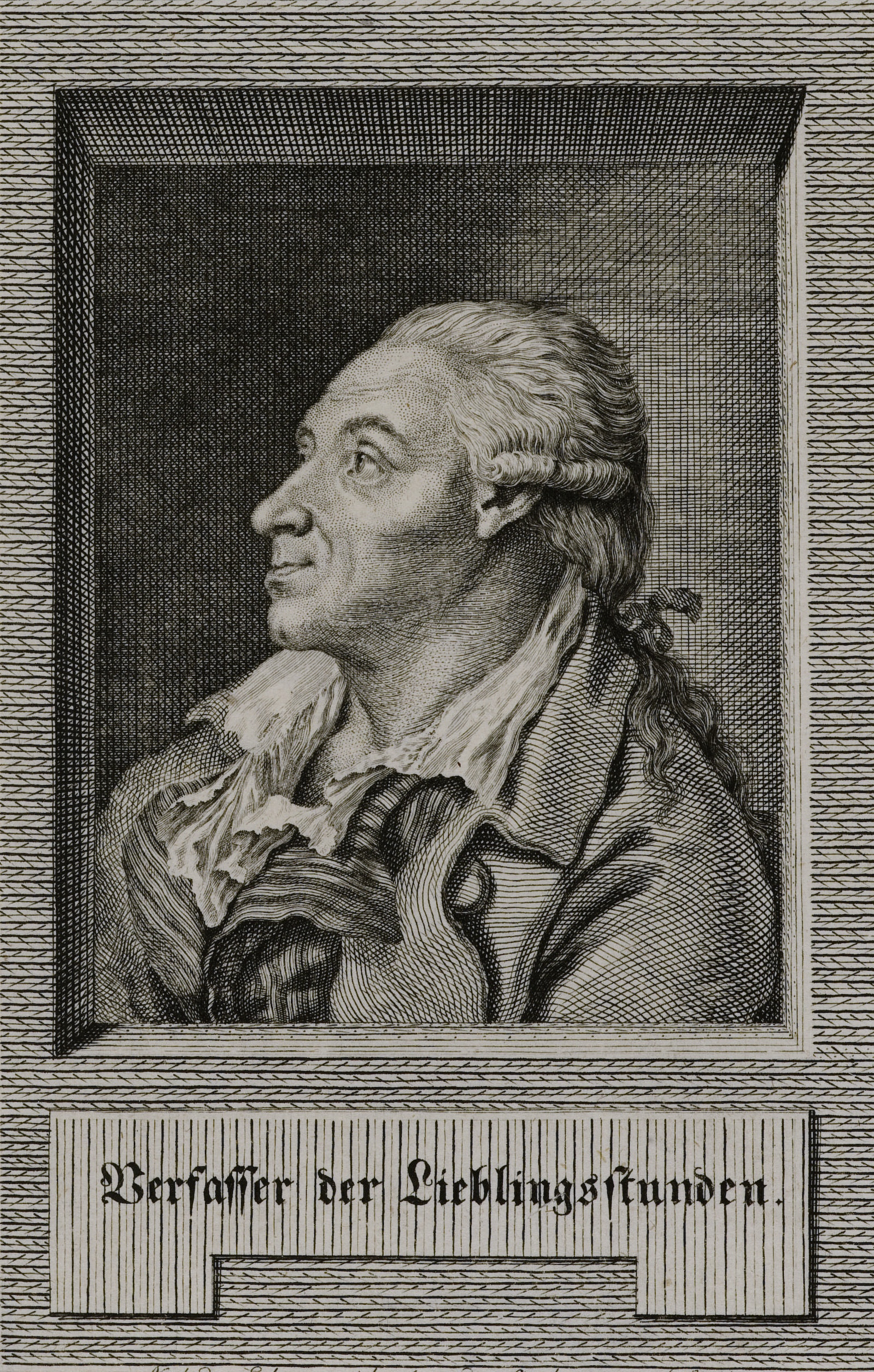 Verfasser der Lieblingsstunden